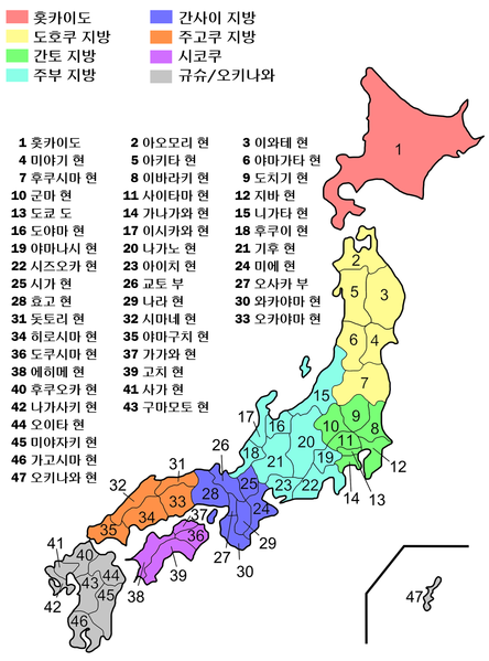 일본 도도부현 및 지방의 지도